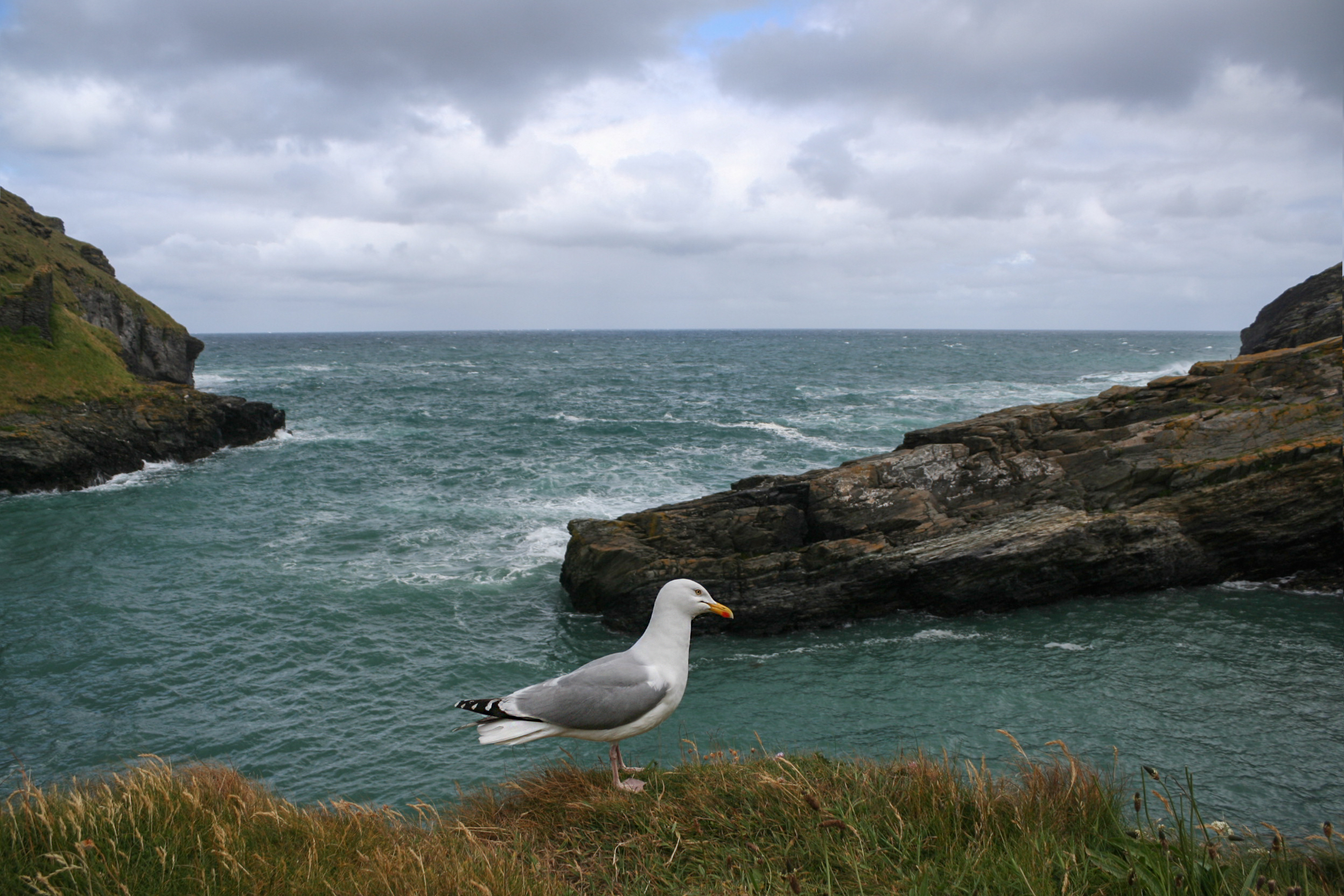 ...die Stelle, in der König , Uther Pendragon, von Merlin verwandelt , und in einer Nebelwand zu Igraine ritt..der Rest ist in der Sage neidergeschrieben..dort zeugte er den König Artus...........